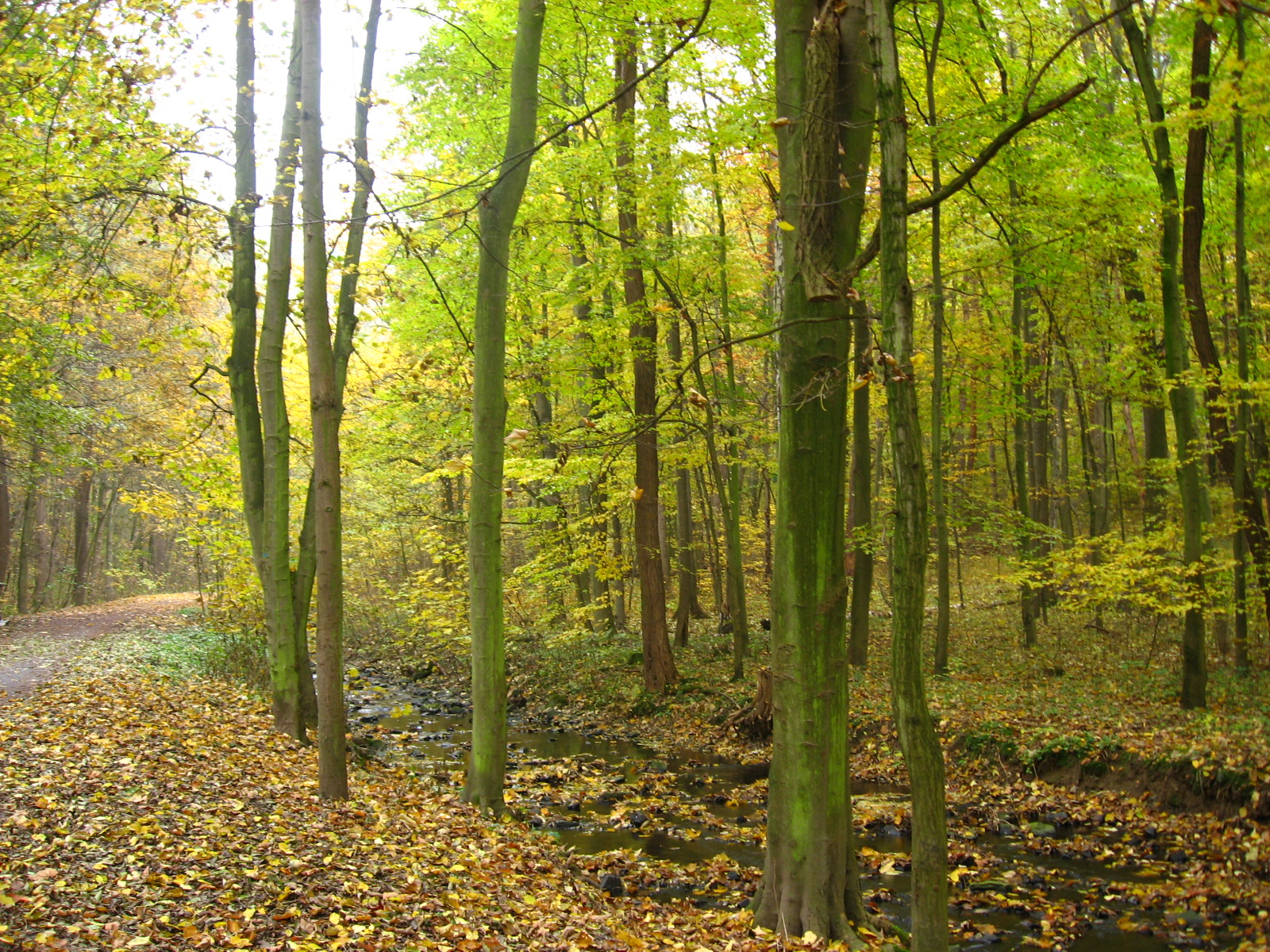 Les u potoka v Modřanské rokli